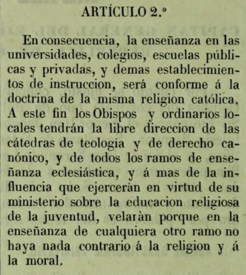 Artículo 2 del Concordato entre Guatemala y la Santa Sede de 1854.